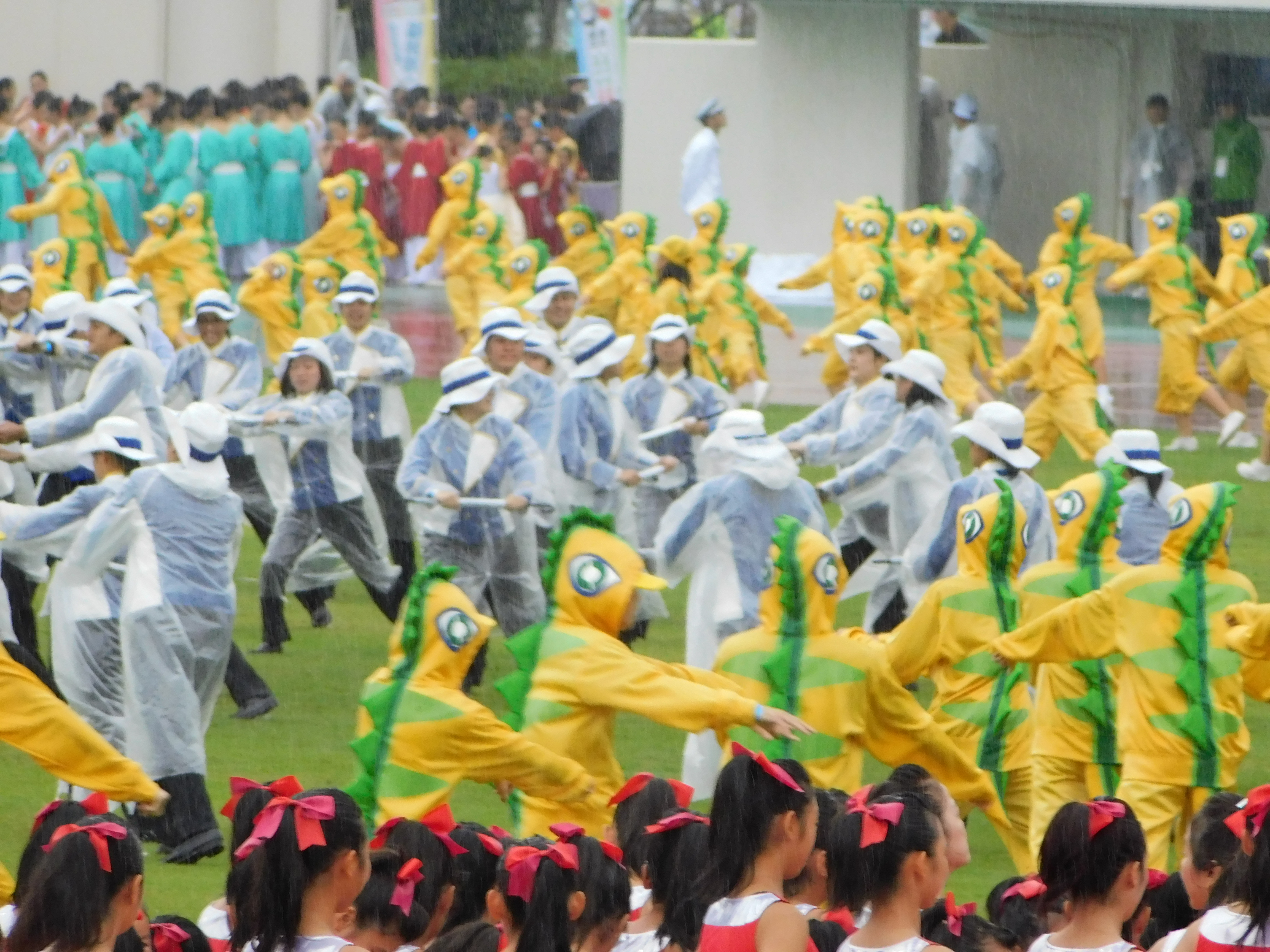 第73回国民体育大会の開会式の式典演技、福井運動公園陸上競技場にて。